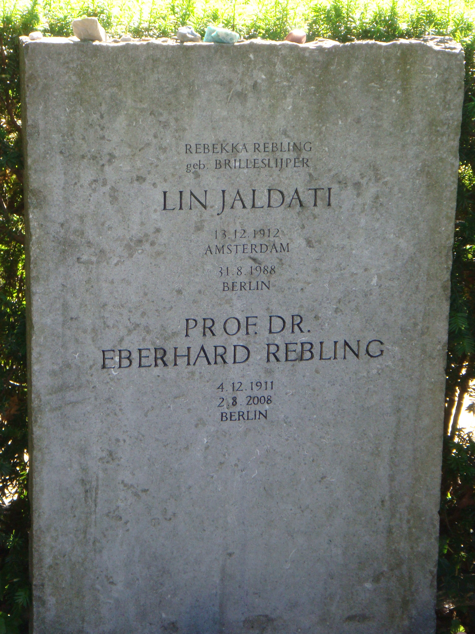 Grabstein von Lin Jaldati und Eberhard Rebling